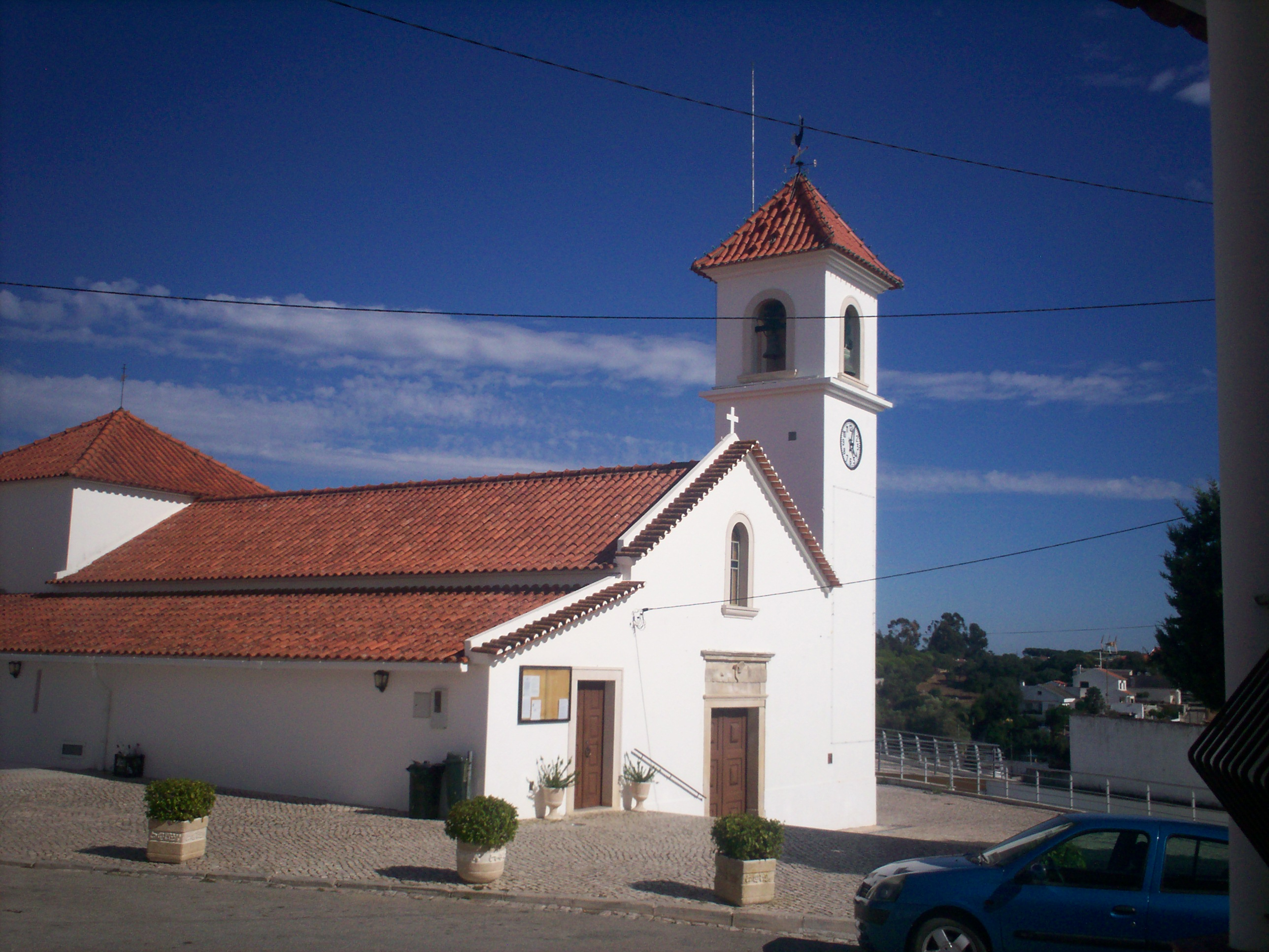 Igreja de Nossa Senhora do Paraíso